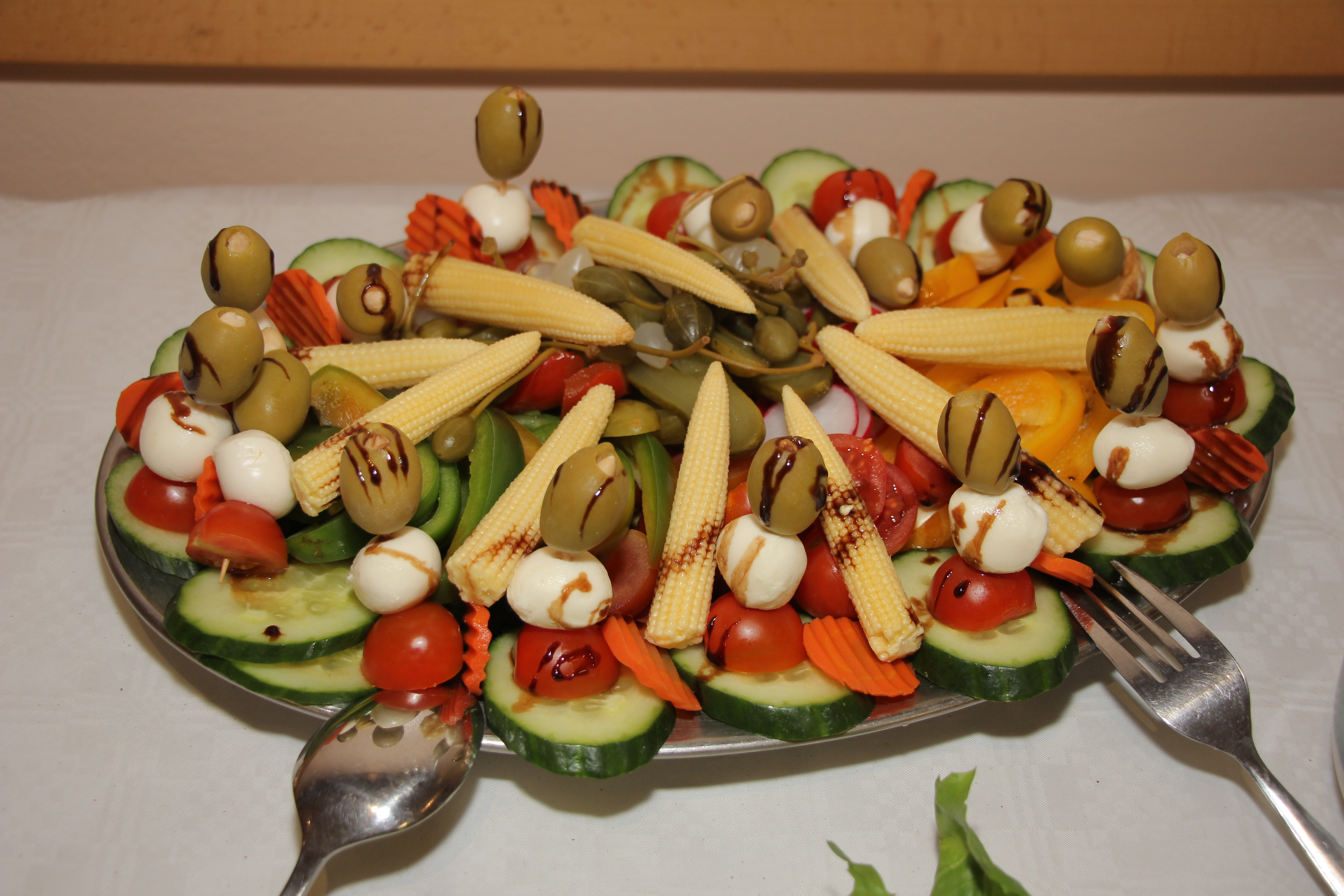 Gemüseteller mit Snacks